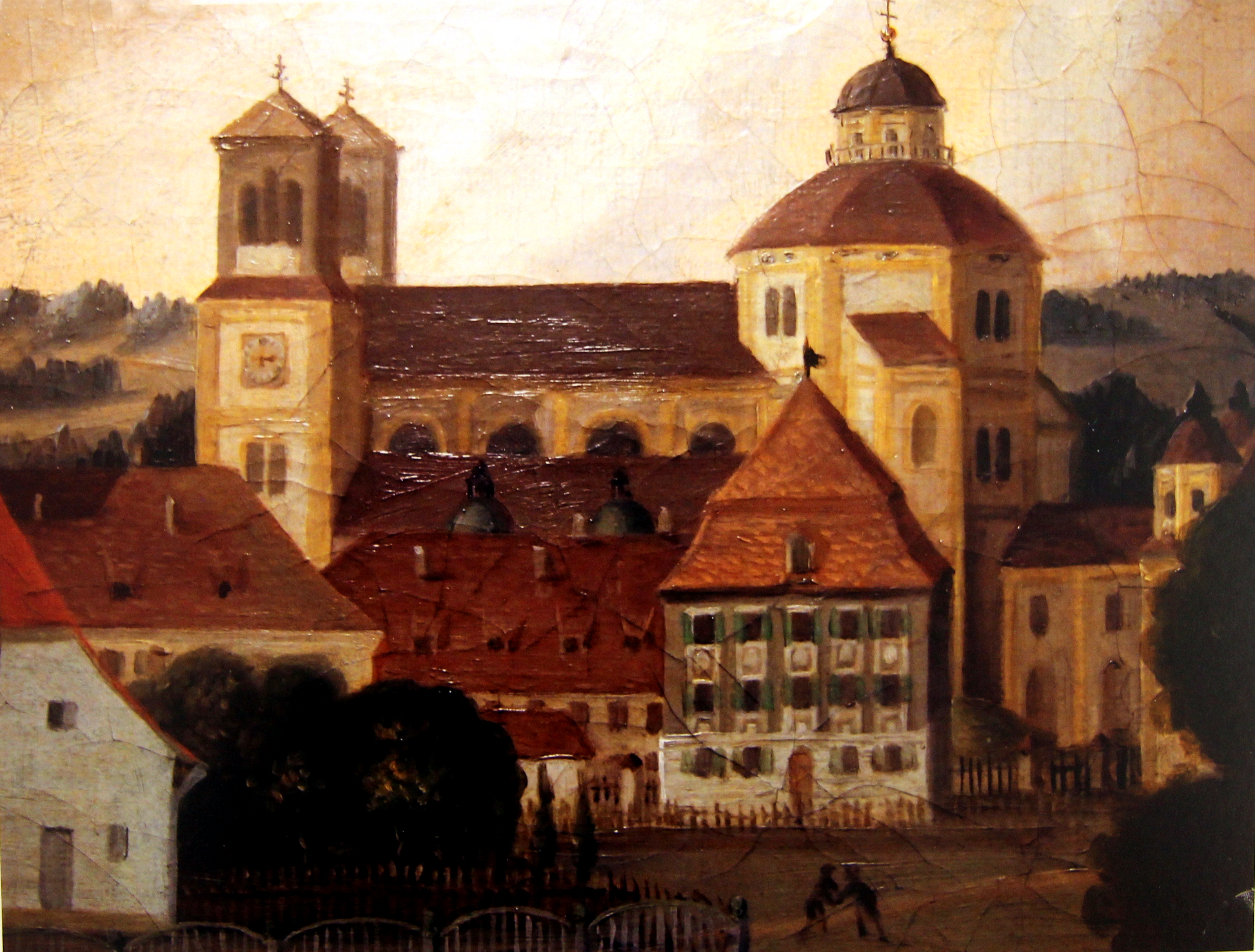 Auf einem Gemälde von 1815 des Hofmalers Franz Sales Lochbihler ist zum ersten Mal das Zumsteinhaus abgebildet. Dahinter die Basilika St. Lorenz in Kempten